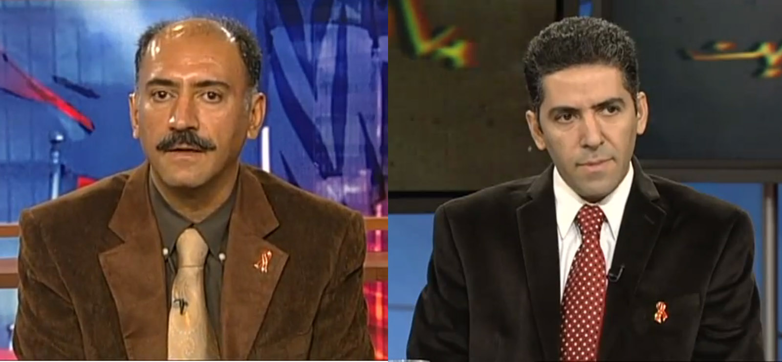 Kamiar and Arash Alaei